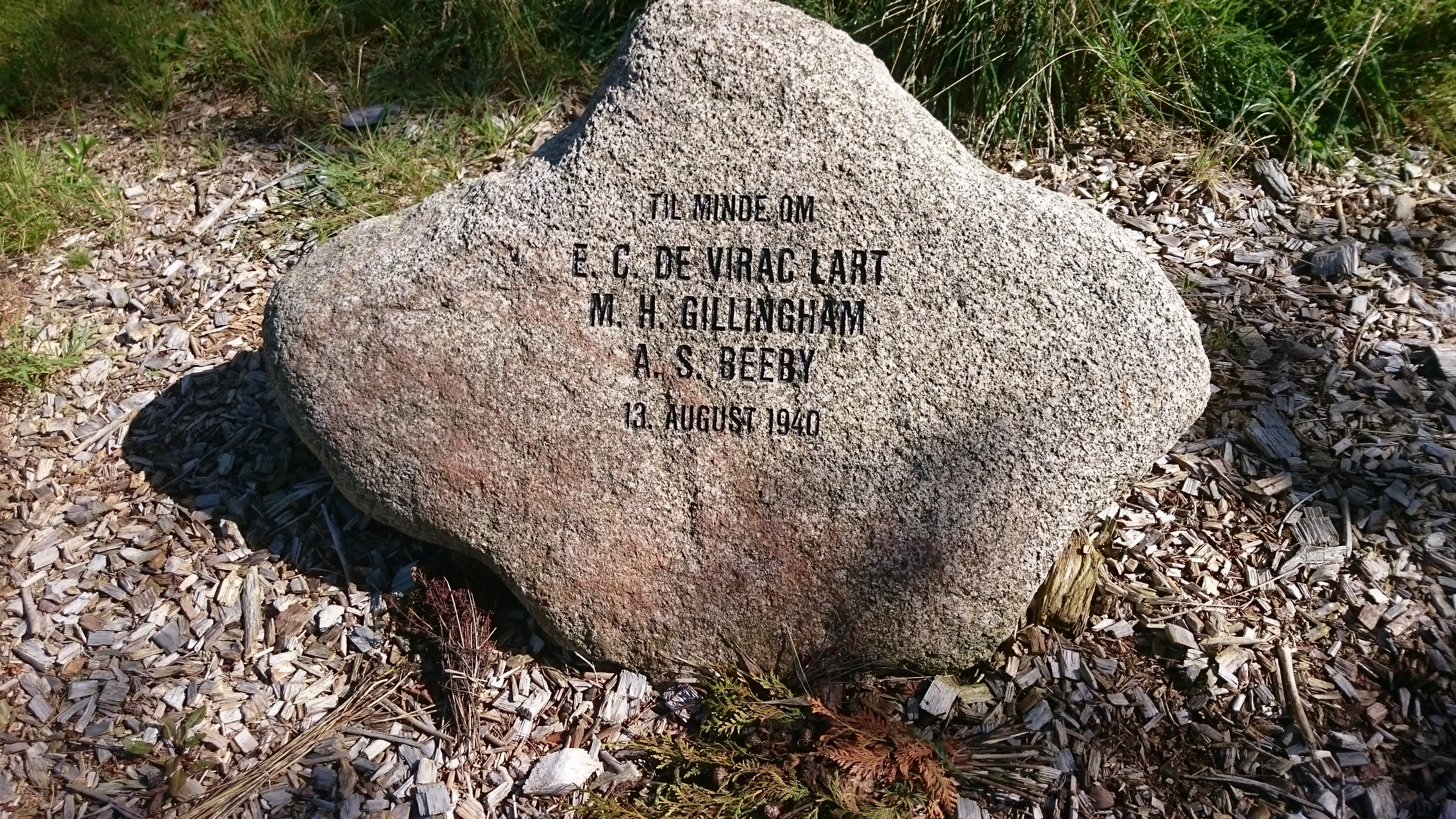 Memorial to airmen, fallen in air battle over Vadum, Aalborg Airbase, Aug. 18 1940